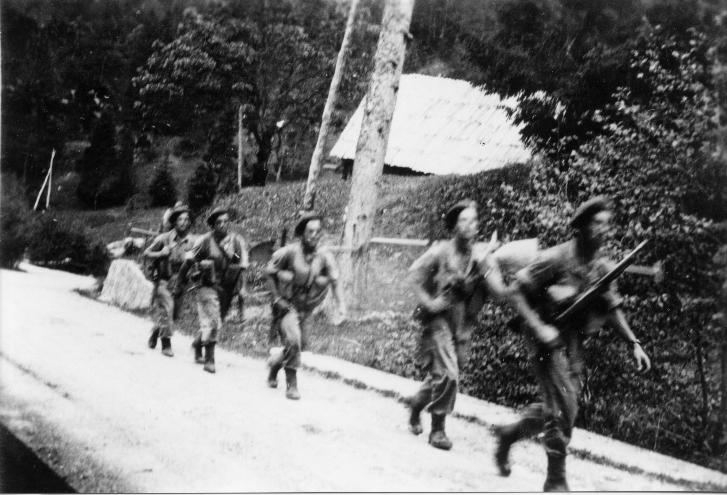 פניתי אל ארכיון בית הפלמ"ח בזו הלשון: שלום רב, ...הריני מבקש לעשות שימוש [בוויקיפדיה] בתמונות המוצגות באתר שלכם. ... משמעות האישור היא מתן היתר לכל מאן דבעי לשכפל את התמונה, *תוך ציון מקורה*. במקרה כזה, ייתכן שתרצו לאשר שימוש בתמונה מוקטנת, שאינה מתאימה להדפסה בספר. תודה, ד"ר עוזי וישנה ותשובתם: ... כל התמונות הנמצאות באתר הפלמ"ח ניתנות להורדה. הן מראש אינן באיכות הדפסה לספר ו/או פרסום אחר. ניתן להשתמש בתמונה המבוקשת תוך ציון העובדה שהיא נמסרה באדיבות "אוצר תמונות הפלמ"ח". בברכה, ד"ר אלדד חרובי, מנהל ארכיון הפלמ"ח. (כתובת הארכיון: )